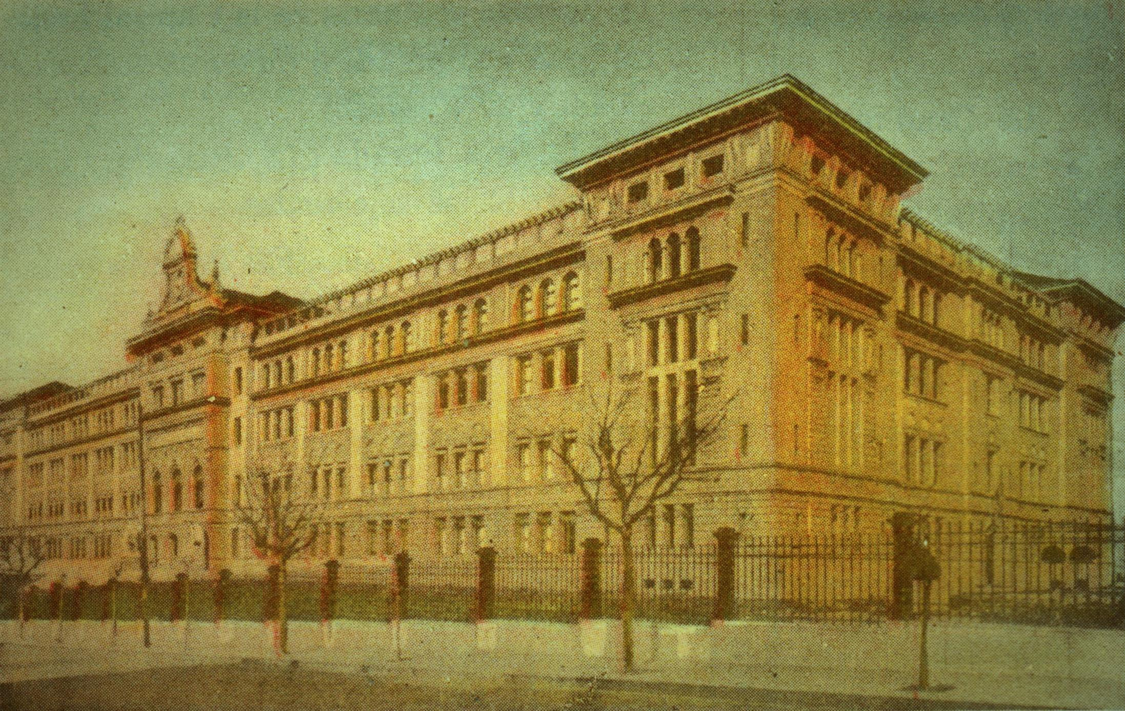 Perspectiva del Edificio Bernasconi en la década de 1930